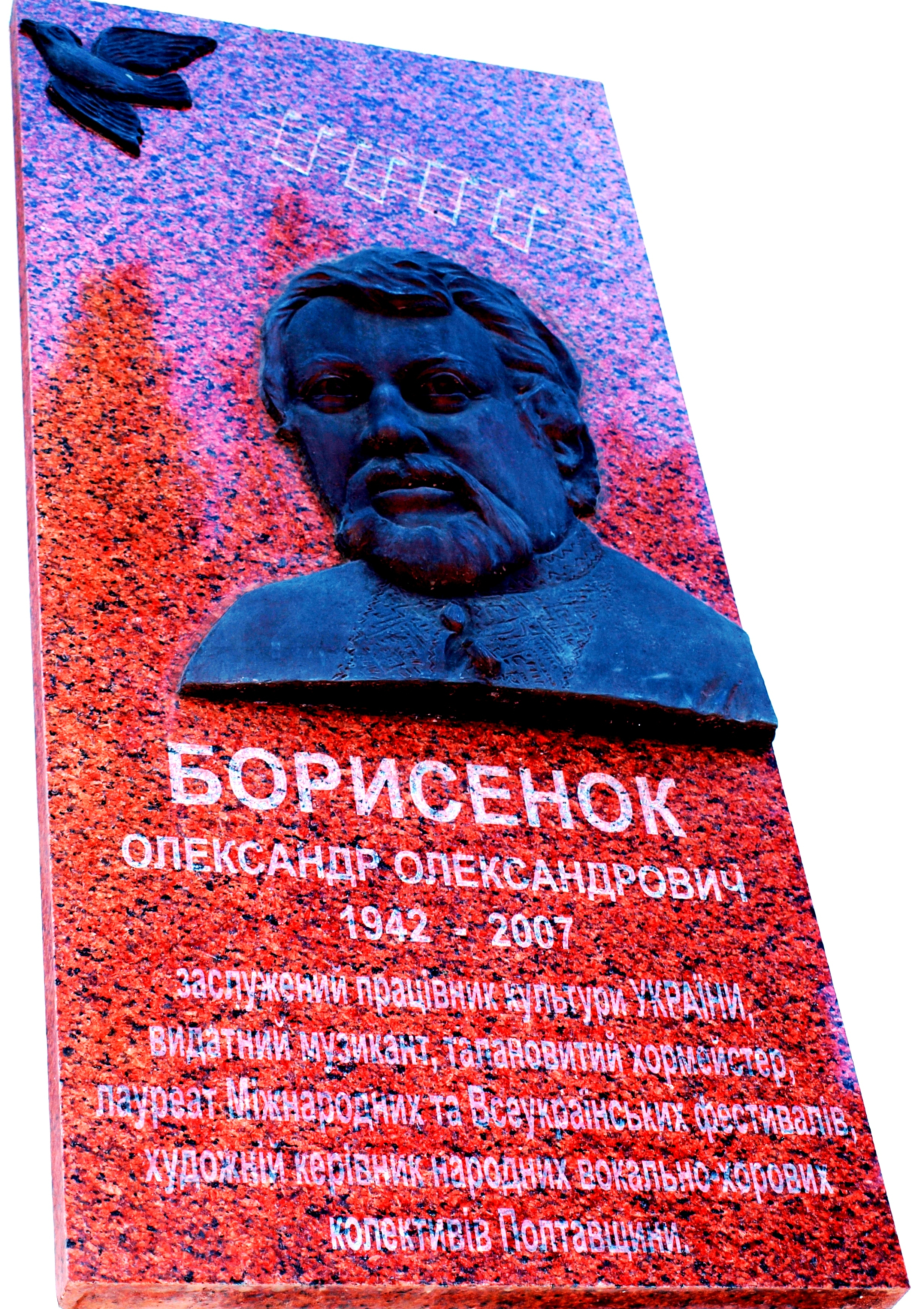 Мемориальная доска музыканту Борисенку А.А. на здании Полтавской филармонии